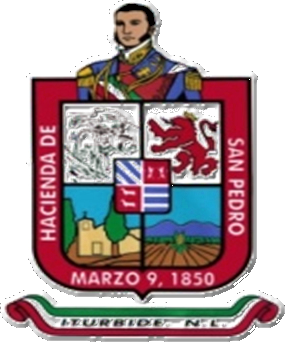 Escudo Municipal - Iturbide, Nuevo León, México